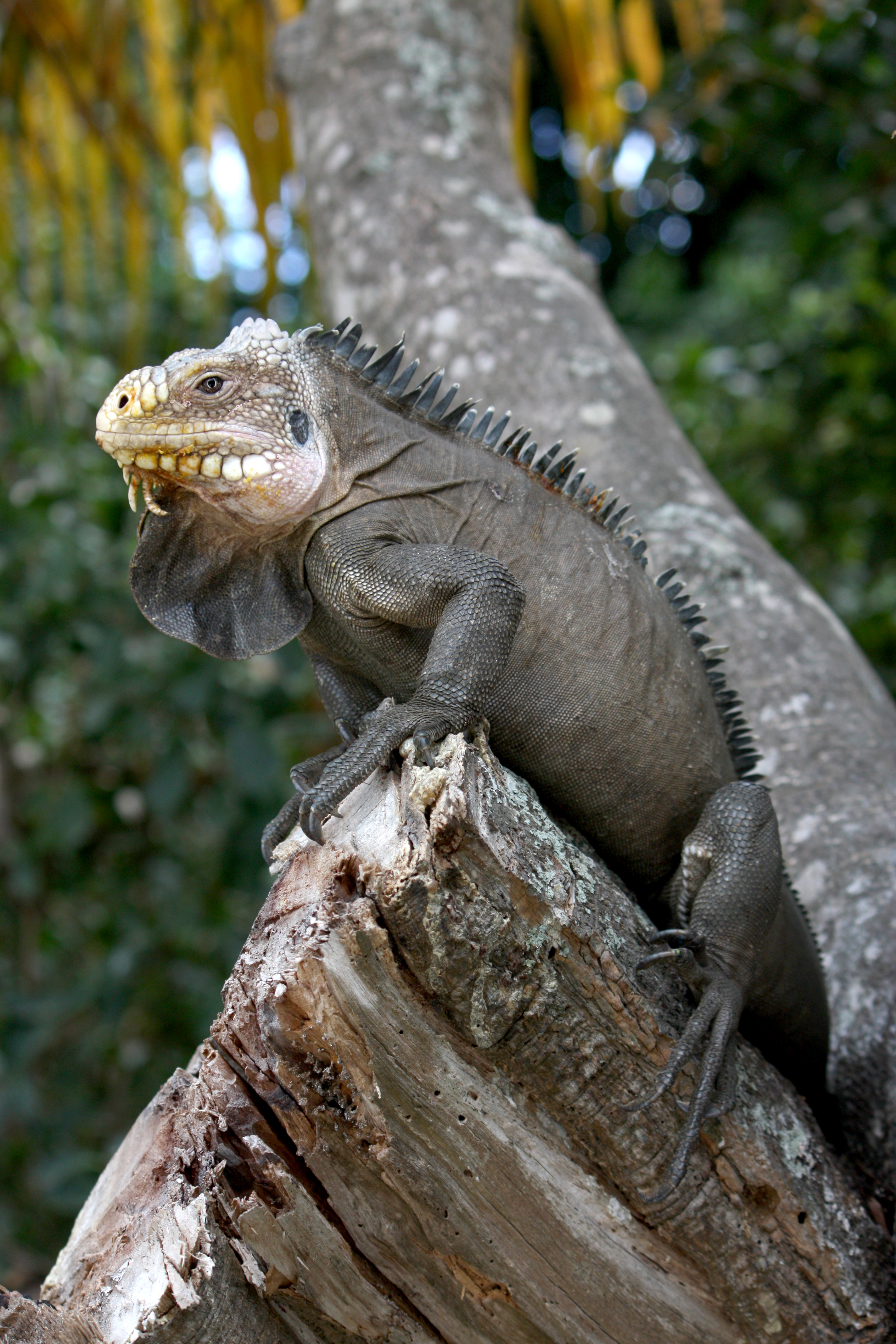 Lesser Antillean Iguana (Iguana delicatissima). Coulibistrie, Dominica.